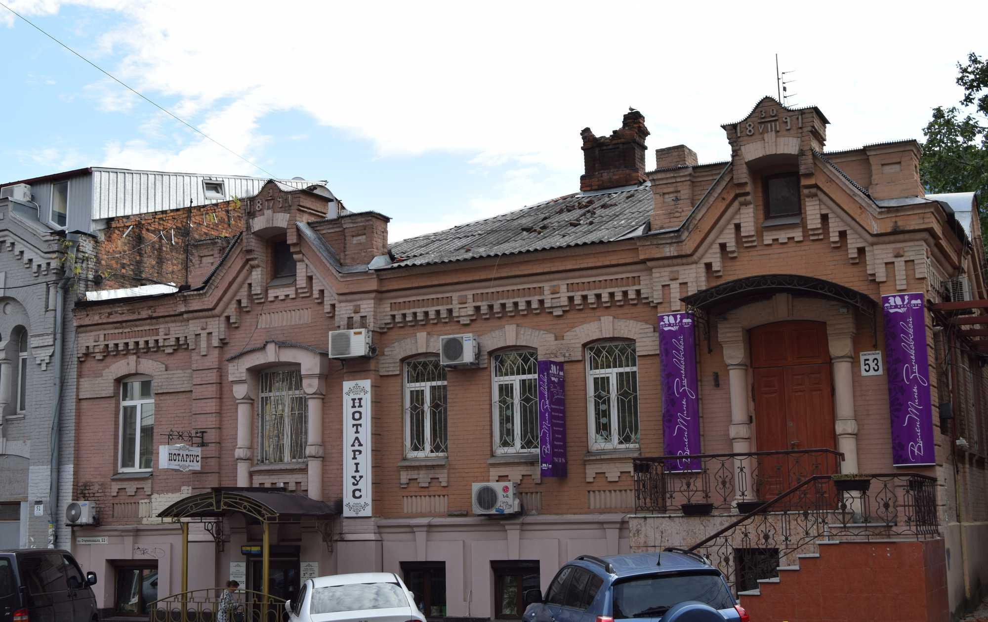 Доходний будинок особнякового типу, Дніпро, вул. Старокозацька (Комсомольська), 53